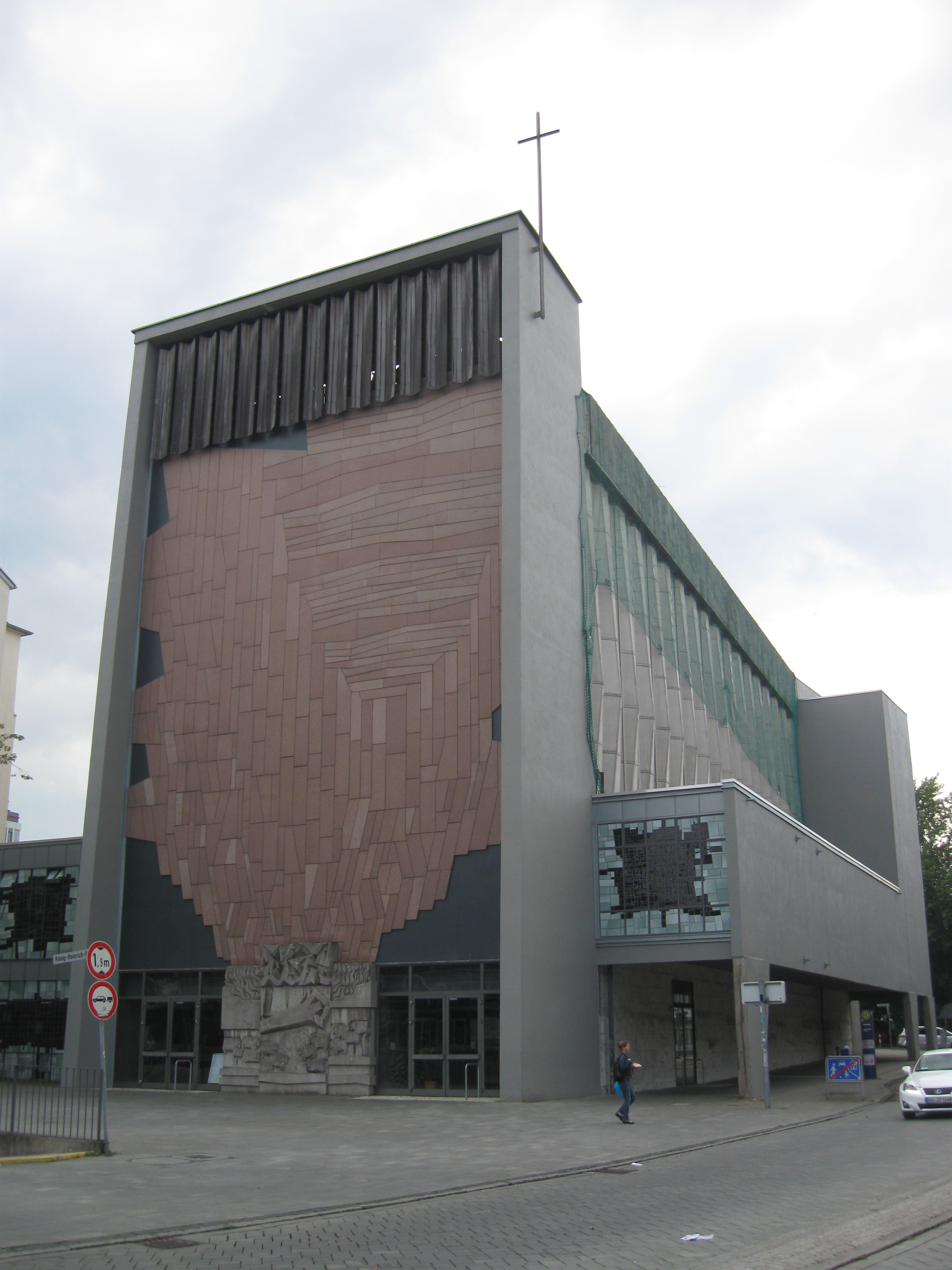 Iglesia Ntra. Stma. Sra. (Duisburgo)